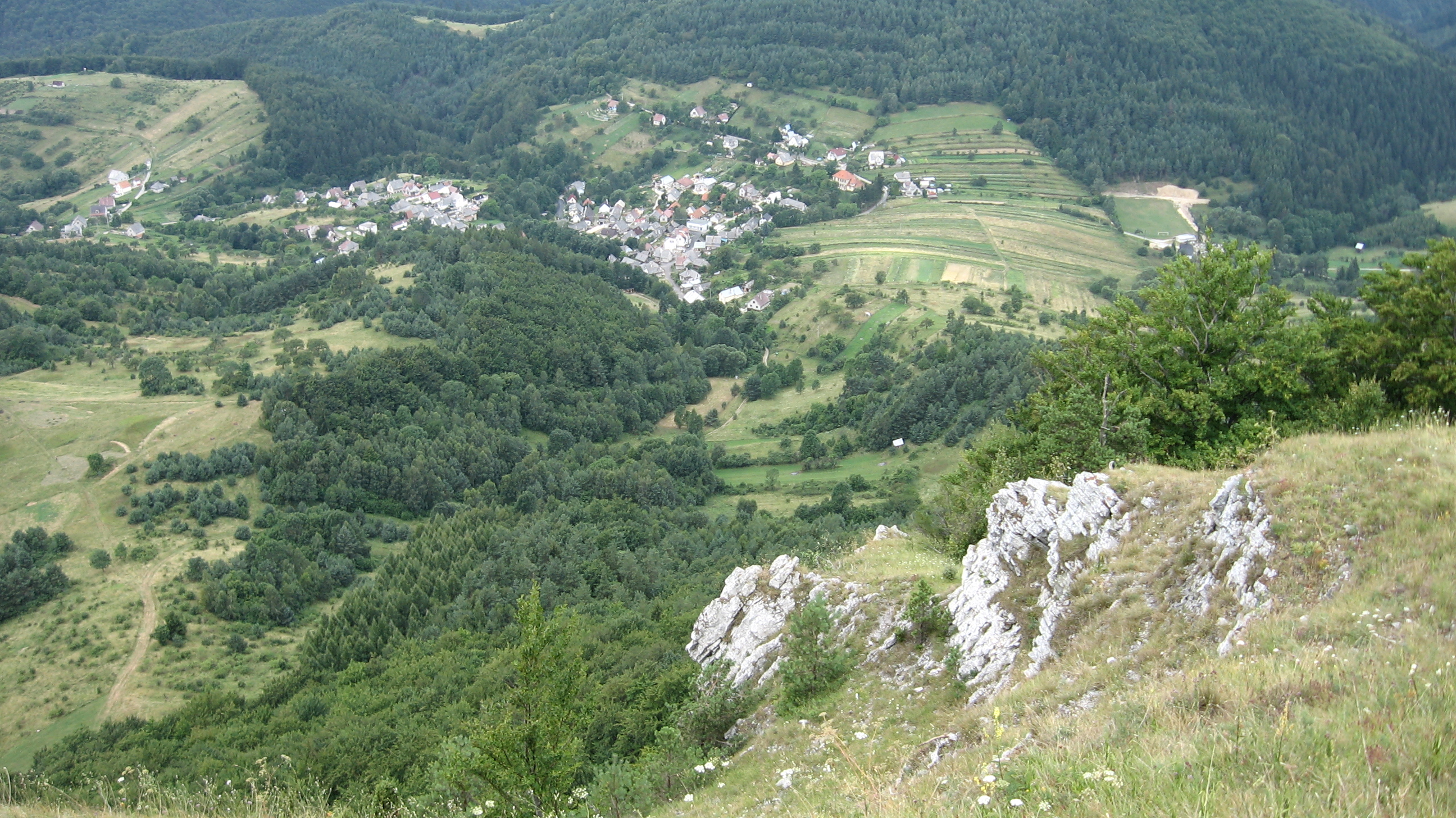 Pohľad na obec z Temešskej skaly